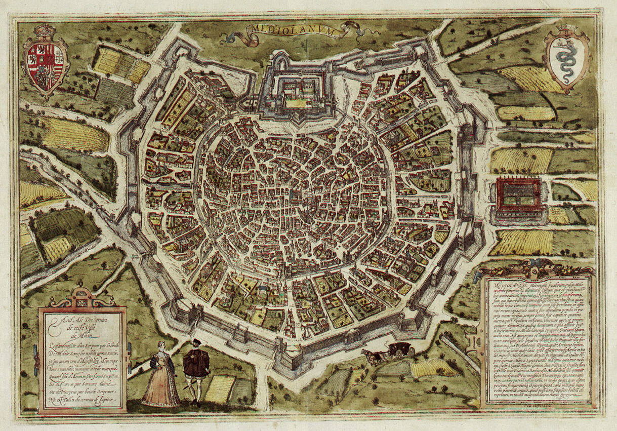 Milano